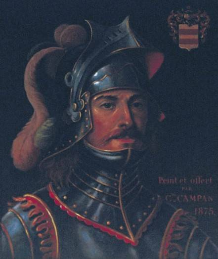 Portrait de Anceau de Garlande peinte par Charles Campan en 1875